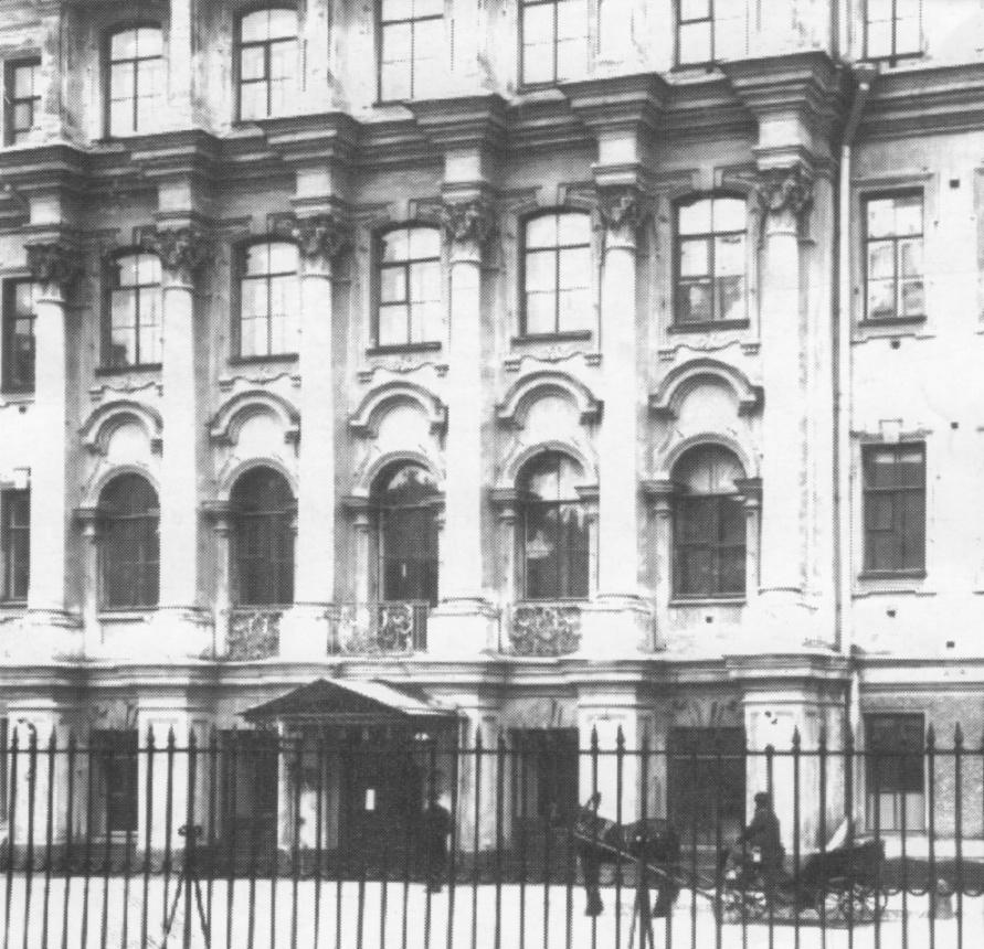 Петершуле, дореволюционная фотография